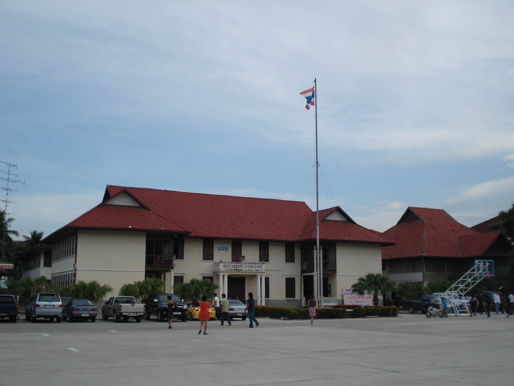 โรงเรียนอรุณประดิษฐ ตำบลคลองกระแชง อำเภอเมืองเพชรบุรี จังหวัดเพชรบุรี